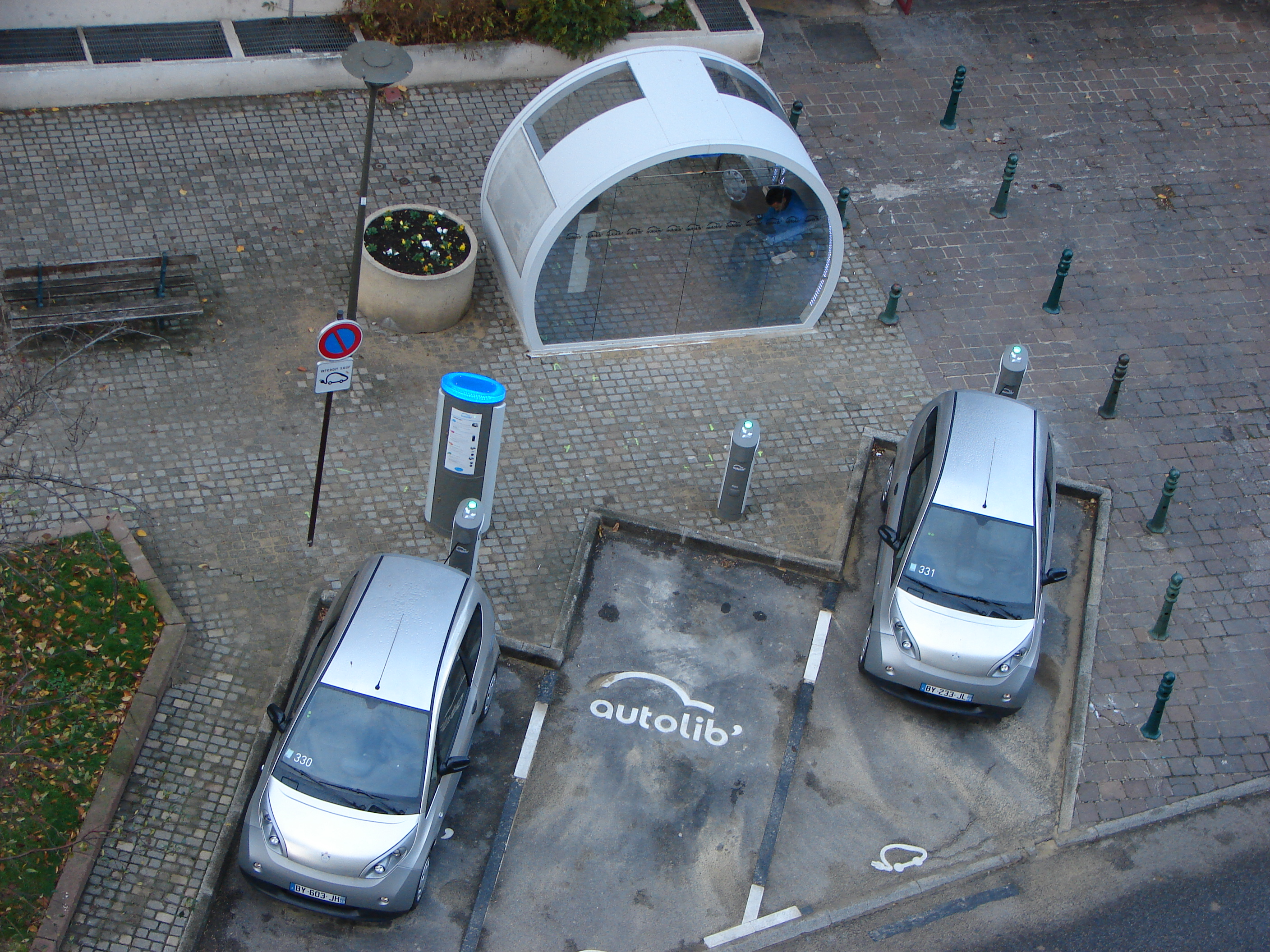 Stationnement d'autolib en 2011 à Suresnes